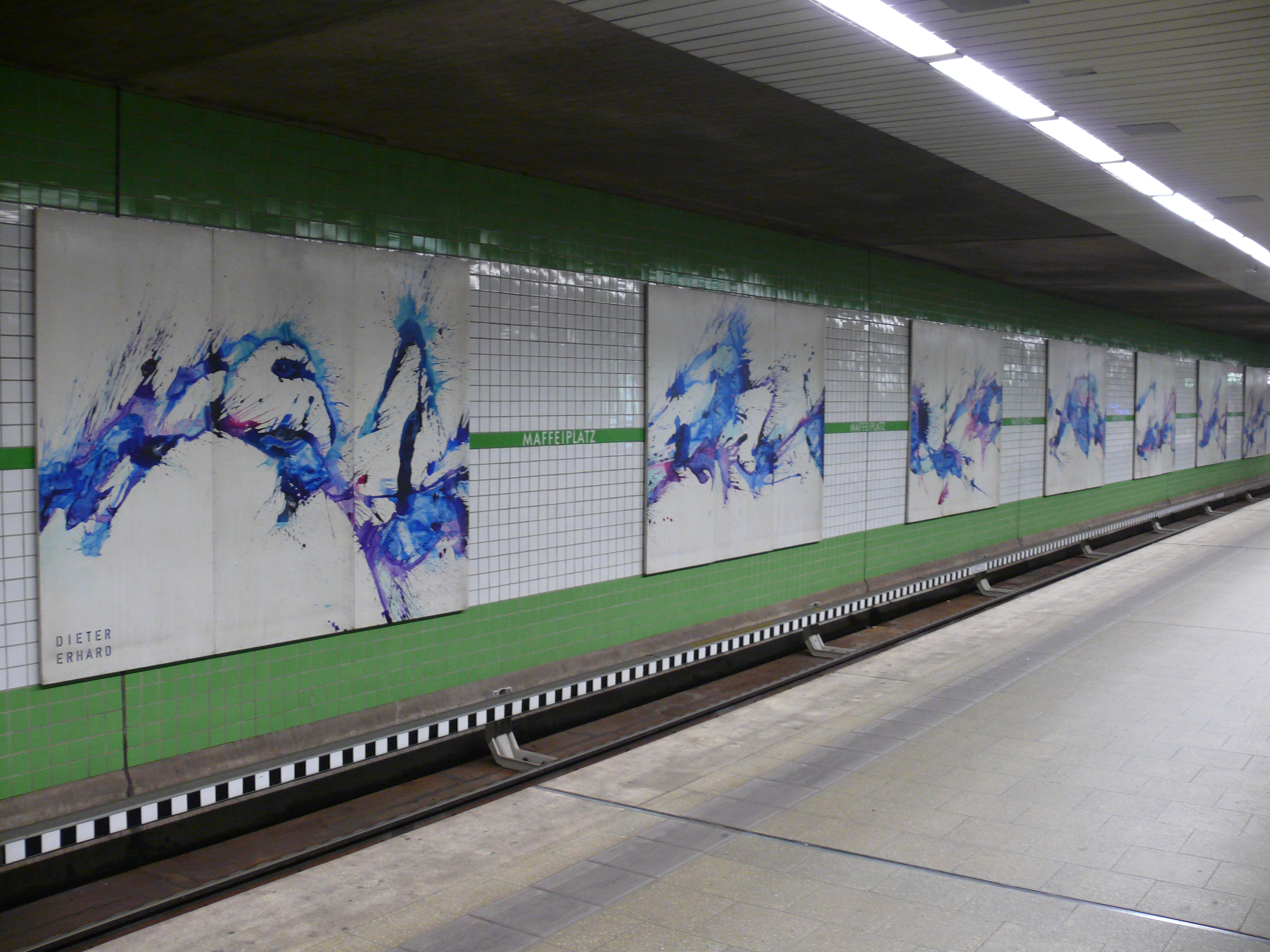 Kunst von Dieter Erhard an den Bahnsteigwänden des U-Bahnhofs Maffeiplatz in Nürnberg.